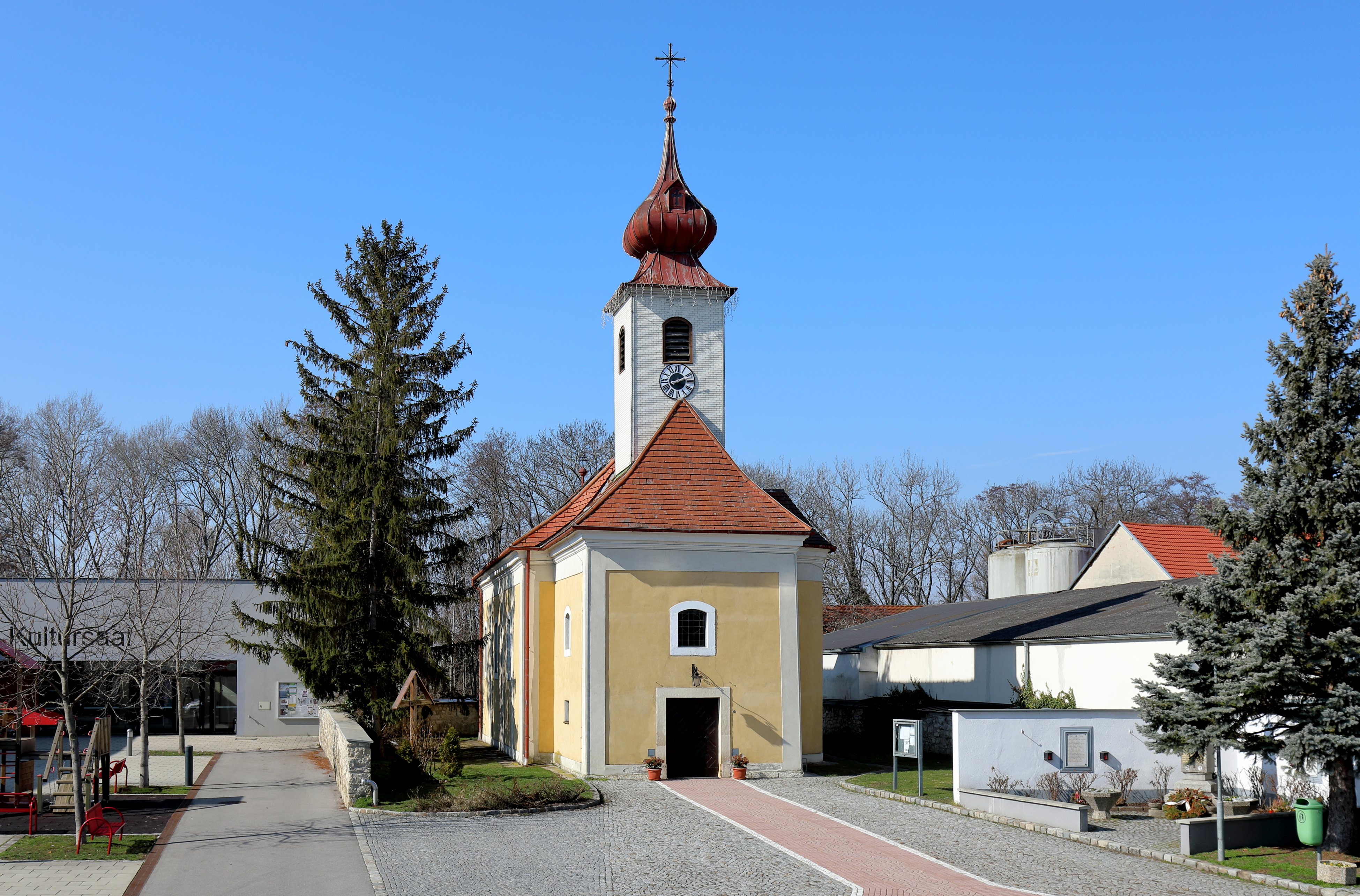 Links der Kultursaal, im Zentrum die röm.-kath. Pfarrkirche hl. Katharina und rechts das Kriegerdenkmal in der niederösterreichischen Marktgemeinde Mitterndorf an der Fischa. Die barocke Saalkirche wurde von 1773 bis 1775 anstelle eines frühgotischen Vorgängerbaus unter teilweise Verwendung dessen Bausubstanz vom Maurermeister Johann Nikolaus Stein errichtet.